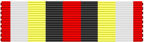 Commandeur in de Orde van de Ster van de Neushoornvogel van Sarawak, Baton